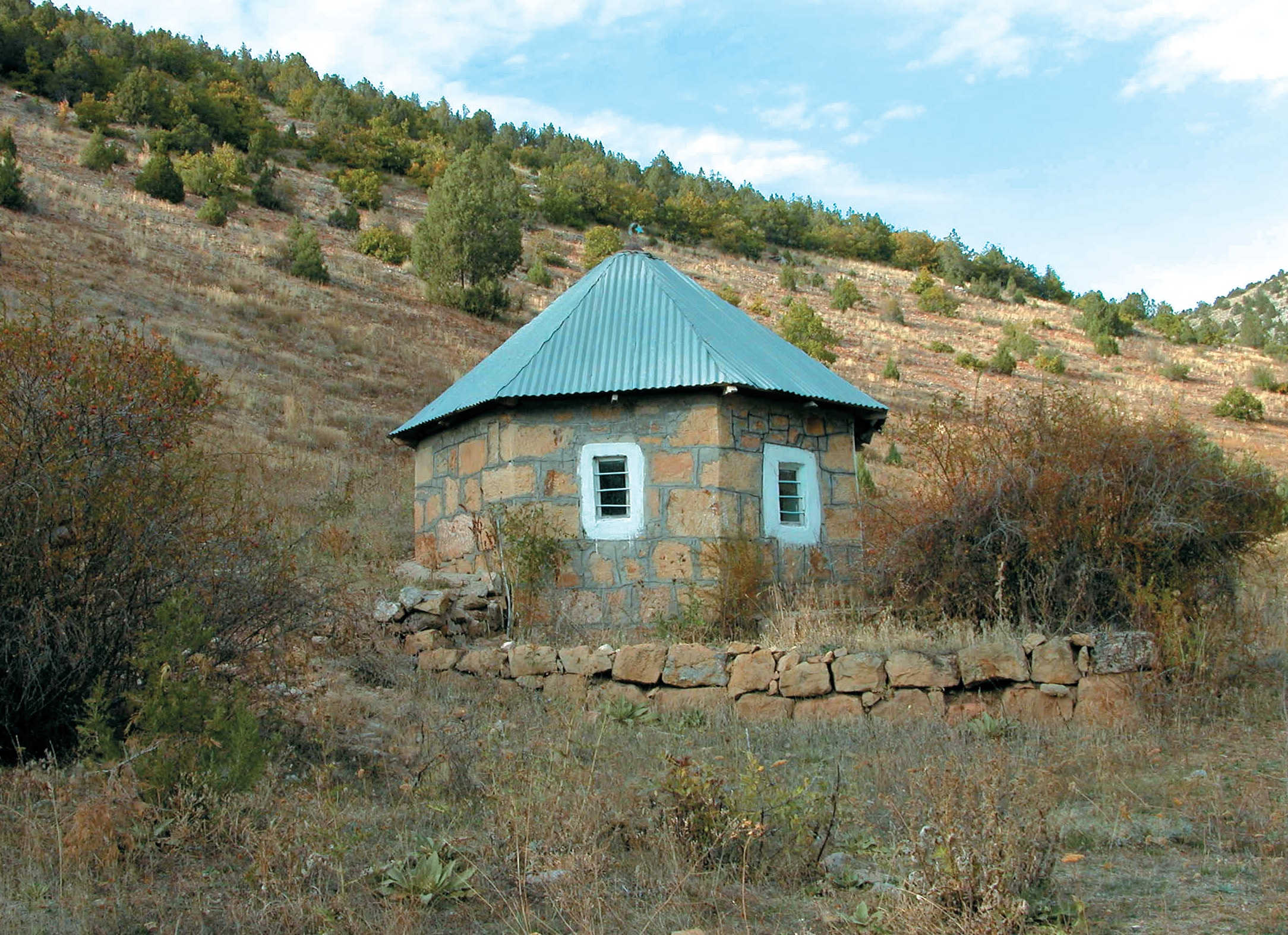 Giresun Osman Baba Türbesi